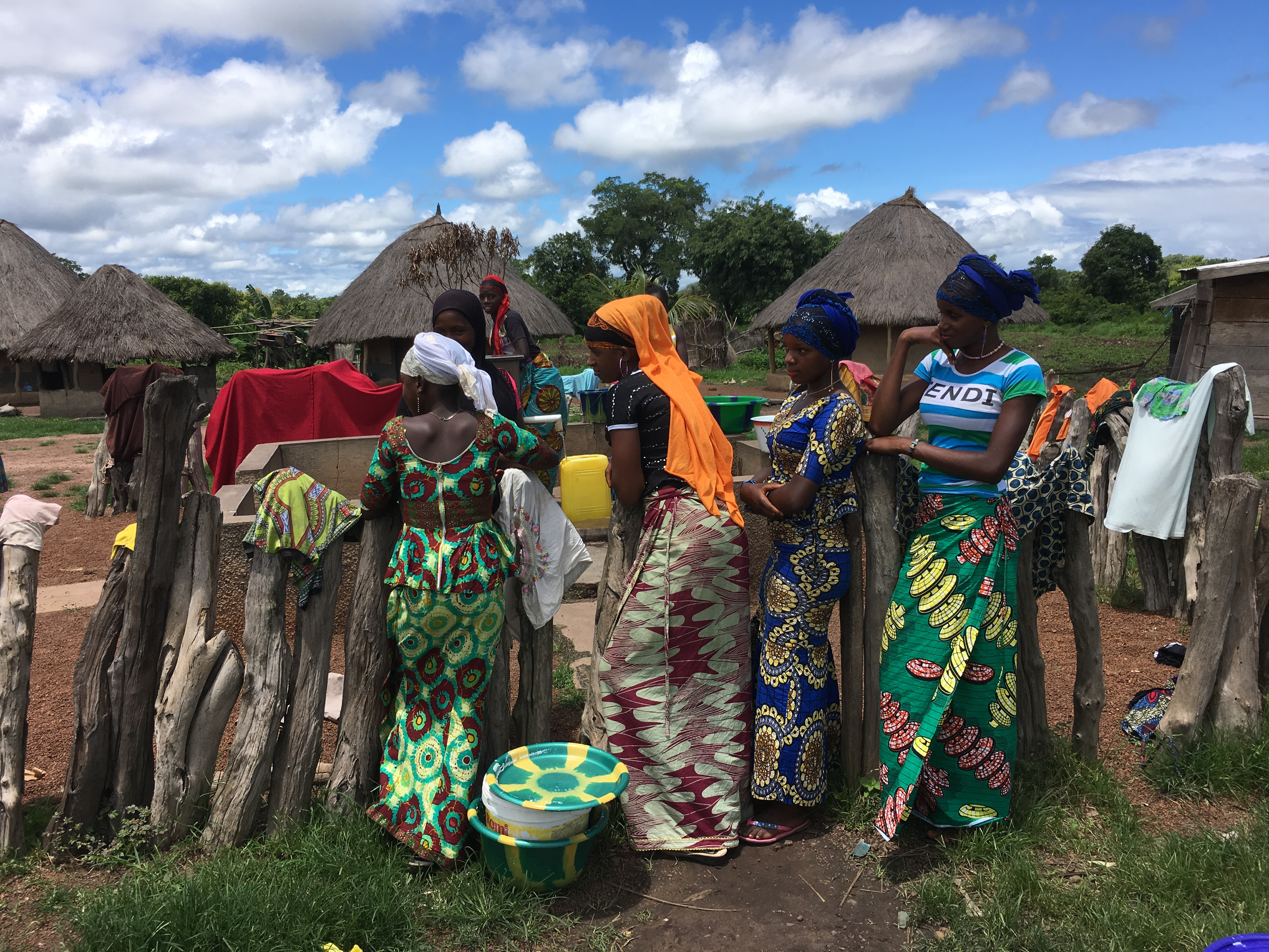 Yalunka-Frauen in Kondebou